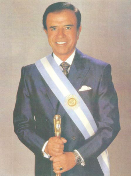 Carlos Menem, presidente de Argentina de 1989 a 1999